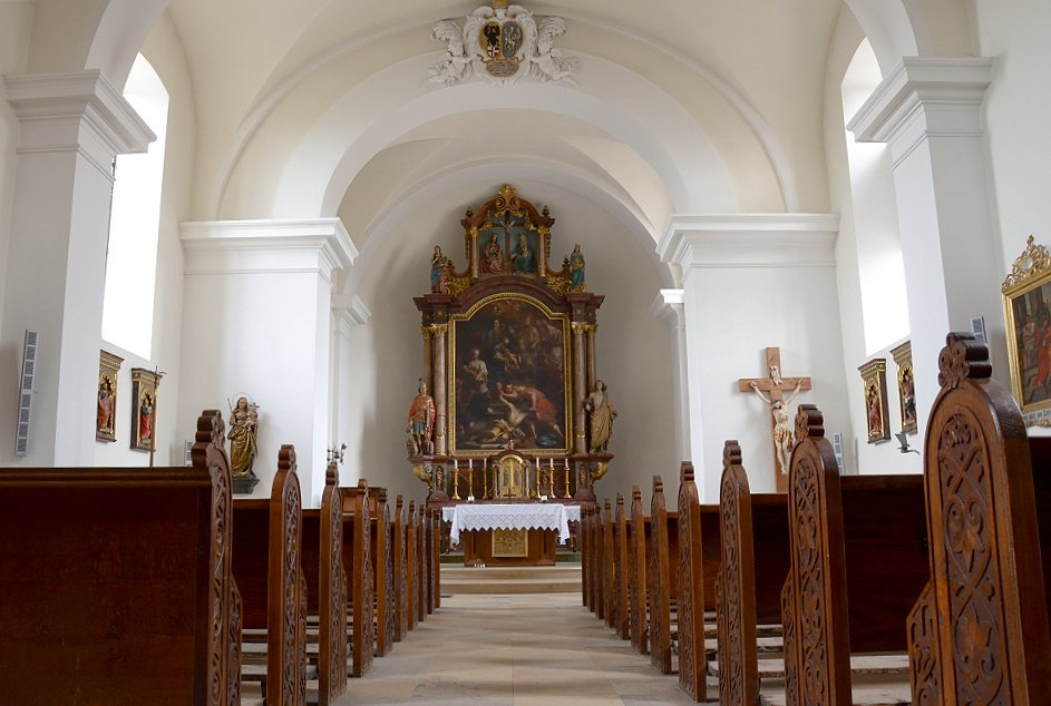 Innenraum der röm.-kath. Pfarrkirche Ansfelden